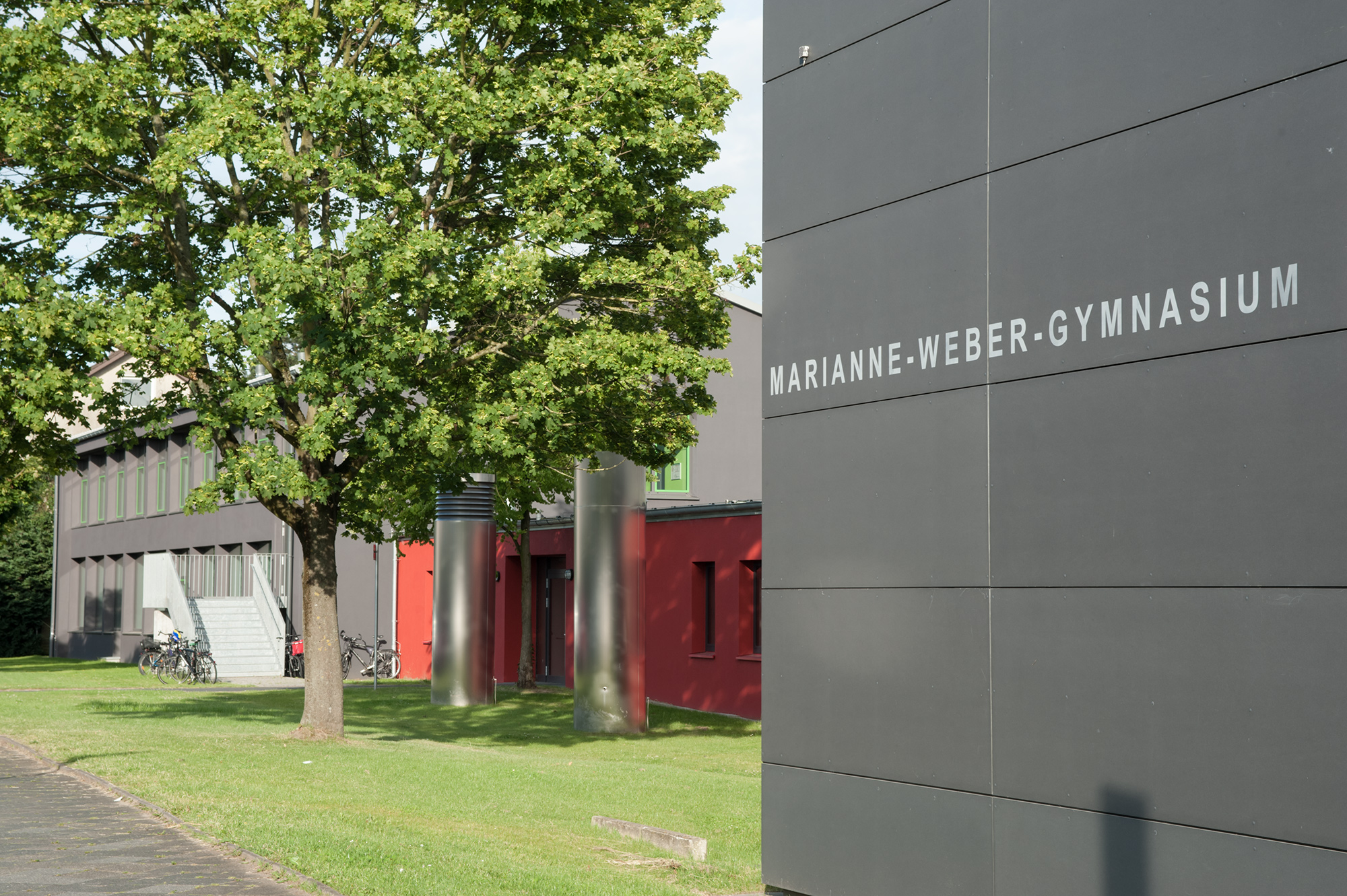 Marianne-Weber-Gymnasium in Lemgo, 2014